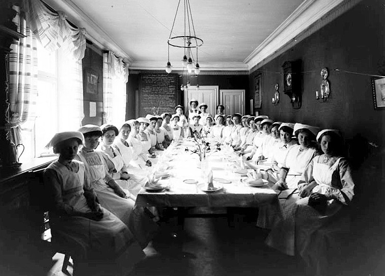 Interiör från matsalen i Elisabeth Östmans Husmodersskola, Jakobsbergsgatan 34